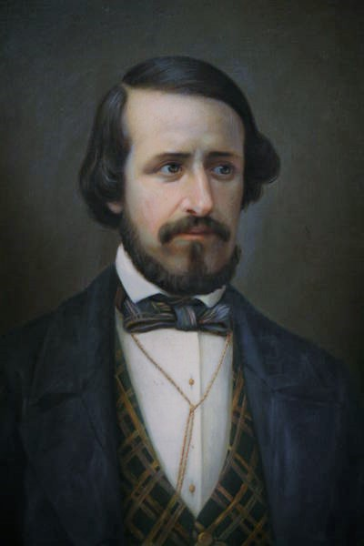 ritratto di Pierfrancesco Leopardi (1813-1851), fratello del poeta Giacomo Leopardi